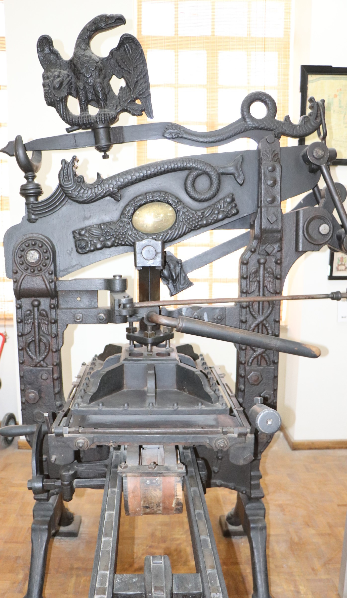 cette presse est exposée dans le musée arménien de la nouvelle Jolfa à Ispahan jouxtant l'église Vank